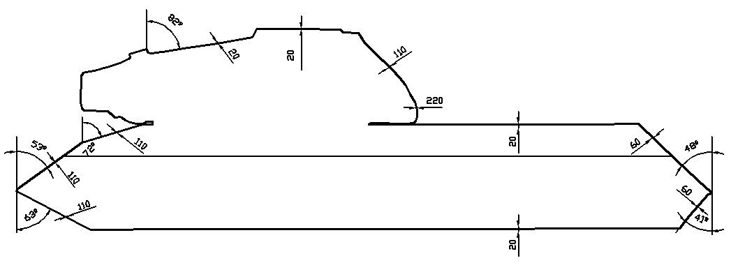 Perfil de un IS-3 con los ángulos y espesores de su blindaje